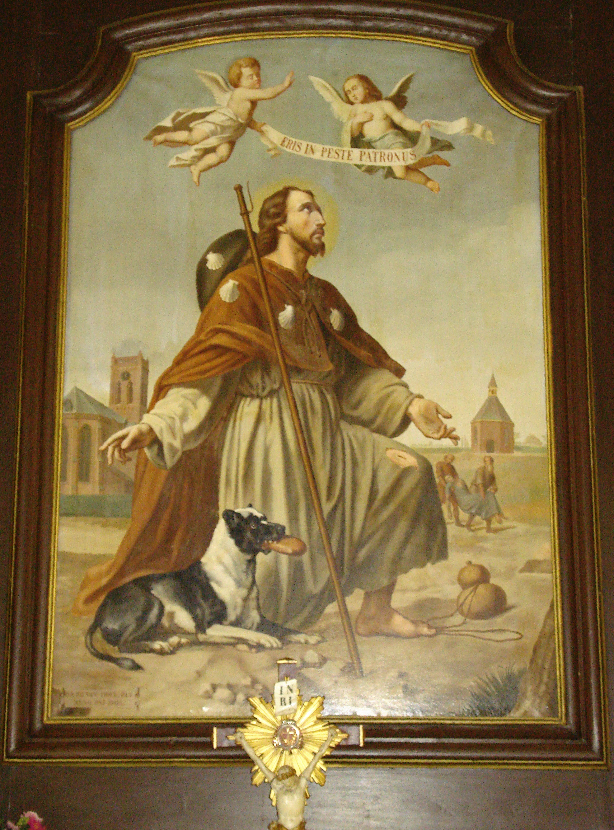 Deursen, Saint Roch, peint en 1903 par M. Heymans dans la chapelle St.Roch